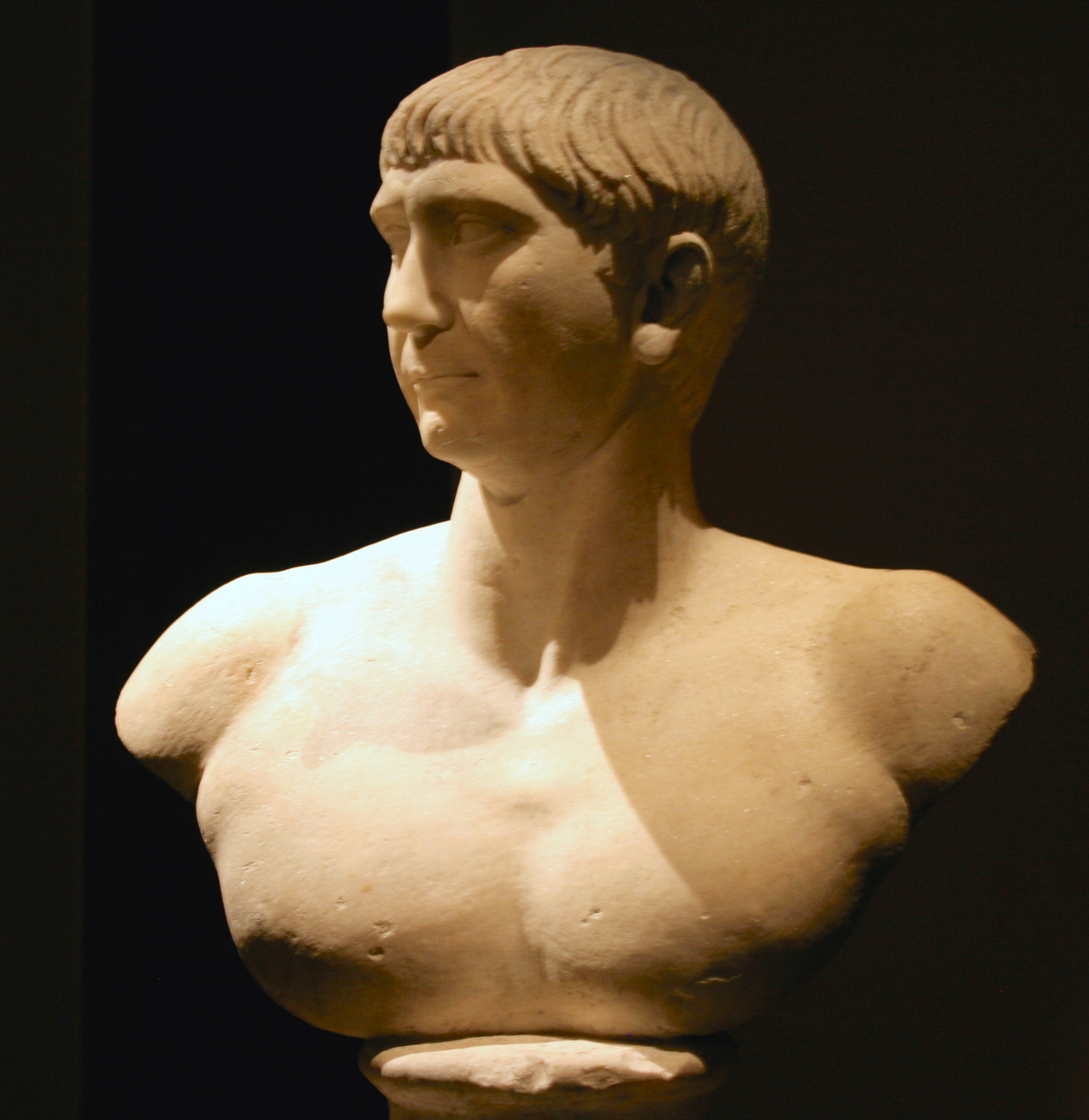 Büste des römischen Kaisers Trajan um 108 n. Ch., im Kunsthistorischem Museum Wien